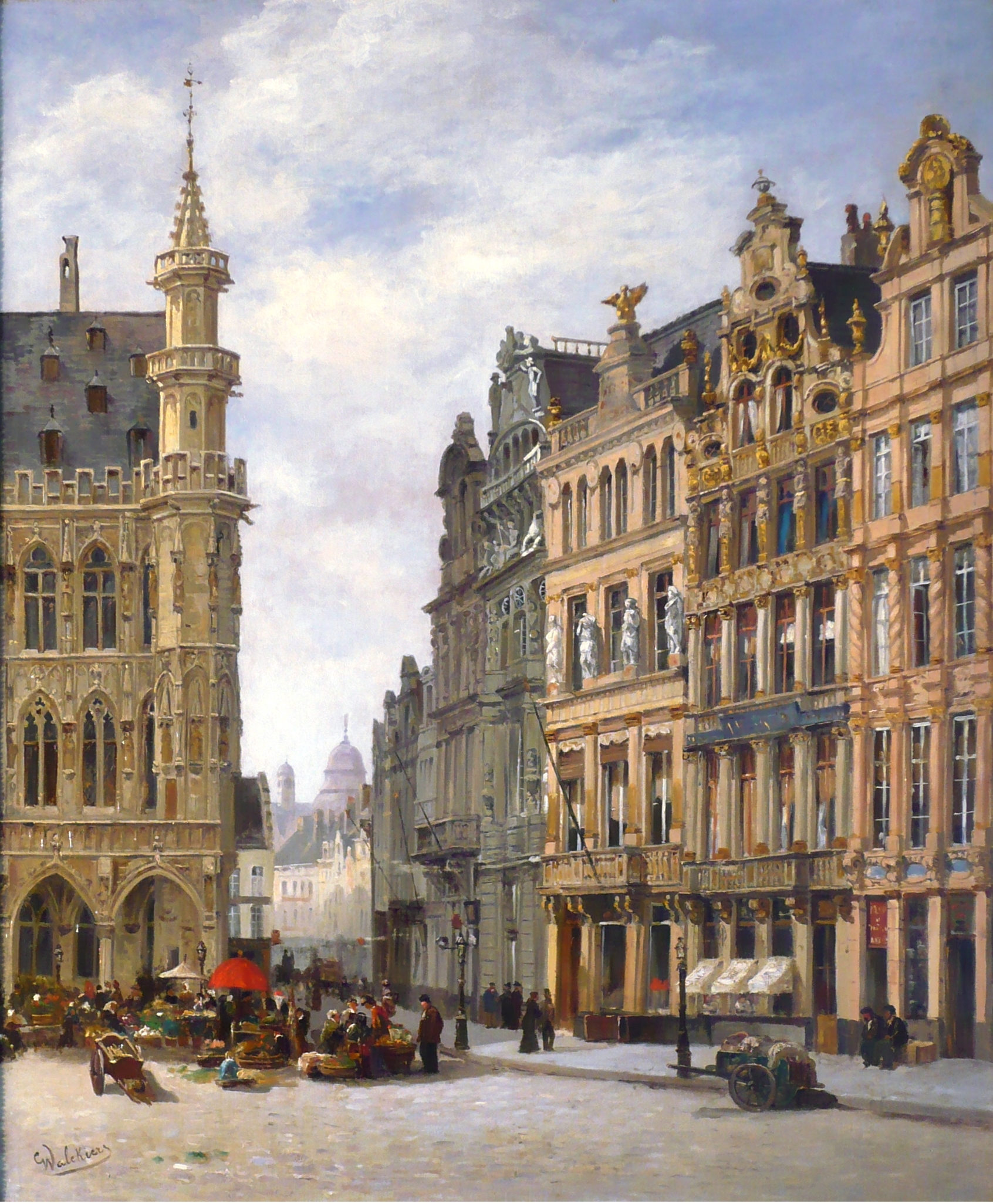 Les maisons 5, 6 et 7 de la Grand-Place et l'aile droite de l'Hôtel de Ville sont visibles